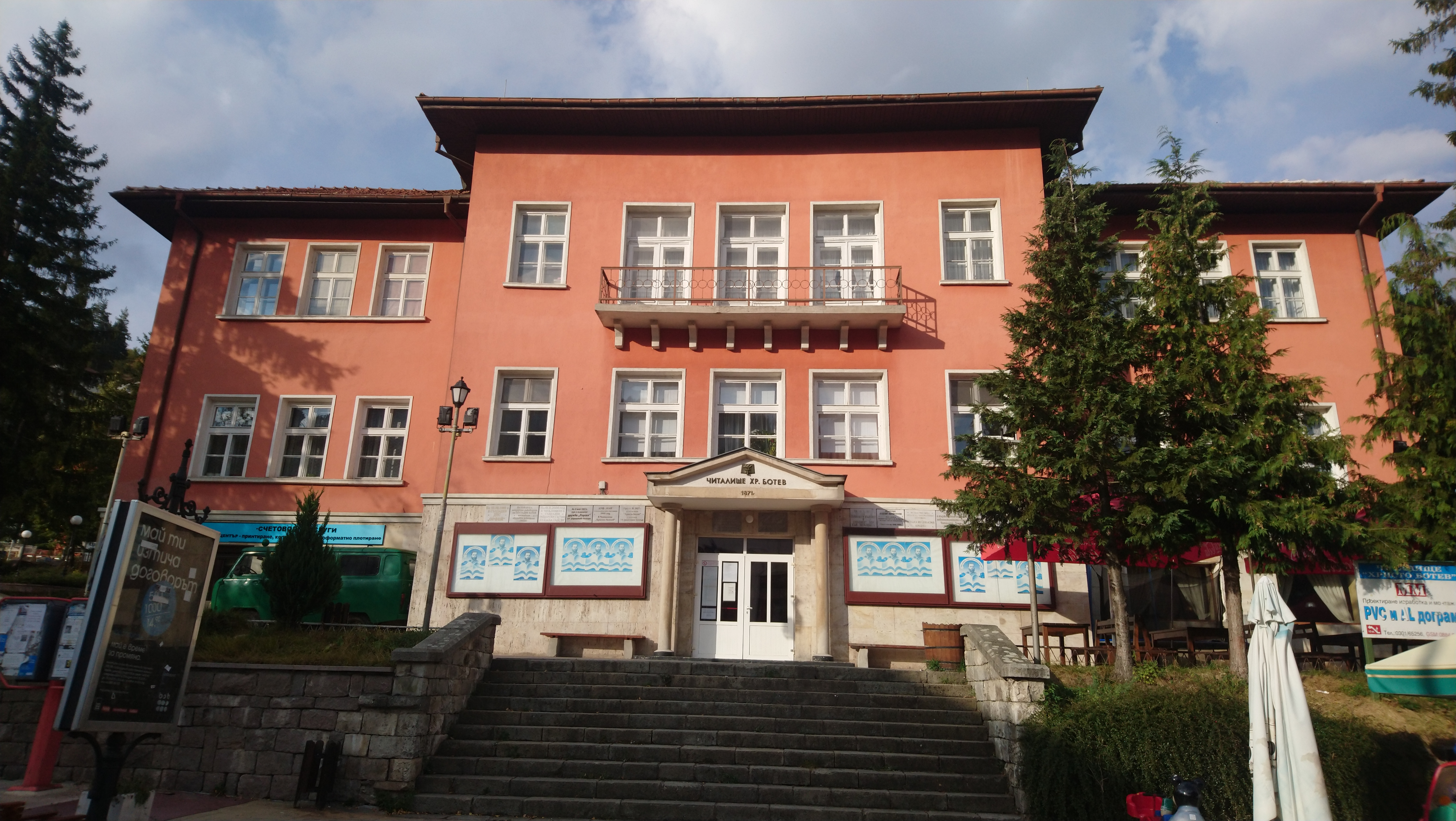 Смолян - читалище Христо Ботев